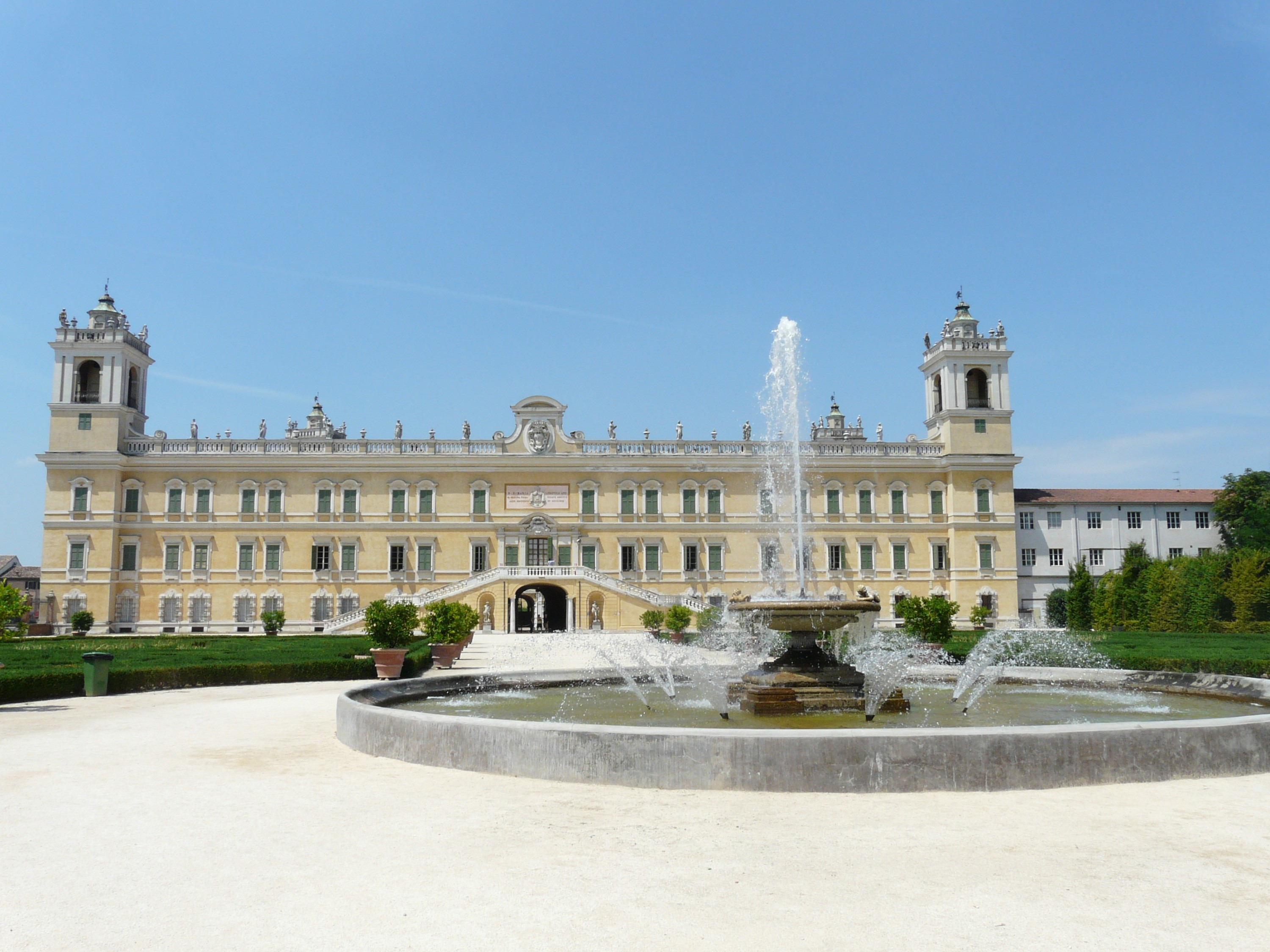 Immagini della Reggia di Colorno, Emilia-Romagna, Italia